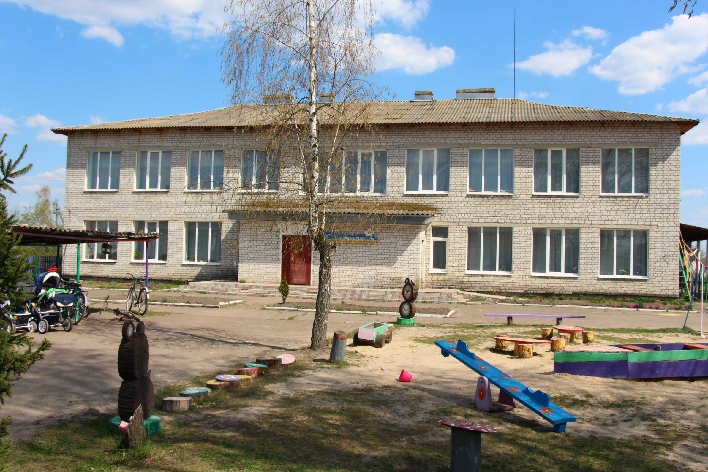 Радовель дитячий садок "Струмочок"